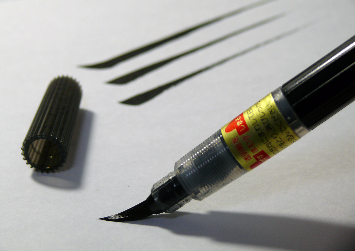 Fude pen (Japanese brush pen)